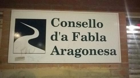 Aragonés: Consello d'a Fabla Aragonesa, siede / seu de Uesca, sede de Huesca